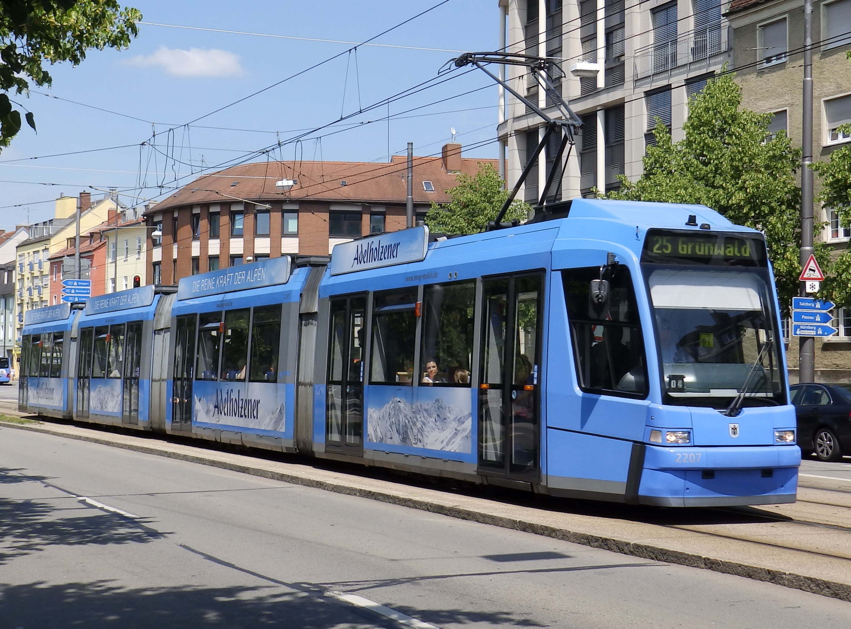 Straßenbahn der Baureieh R 3.3 auf der Linie 25 fährt am Grünwalder Stadion vorbei (Juni 2014).